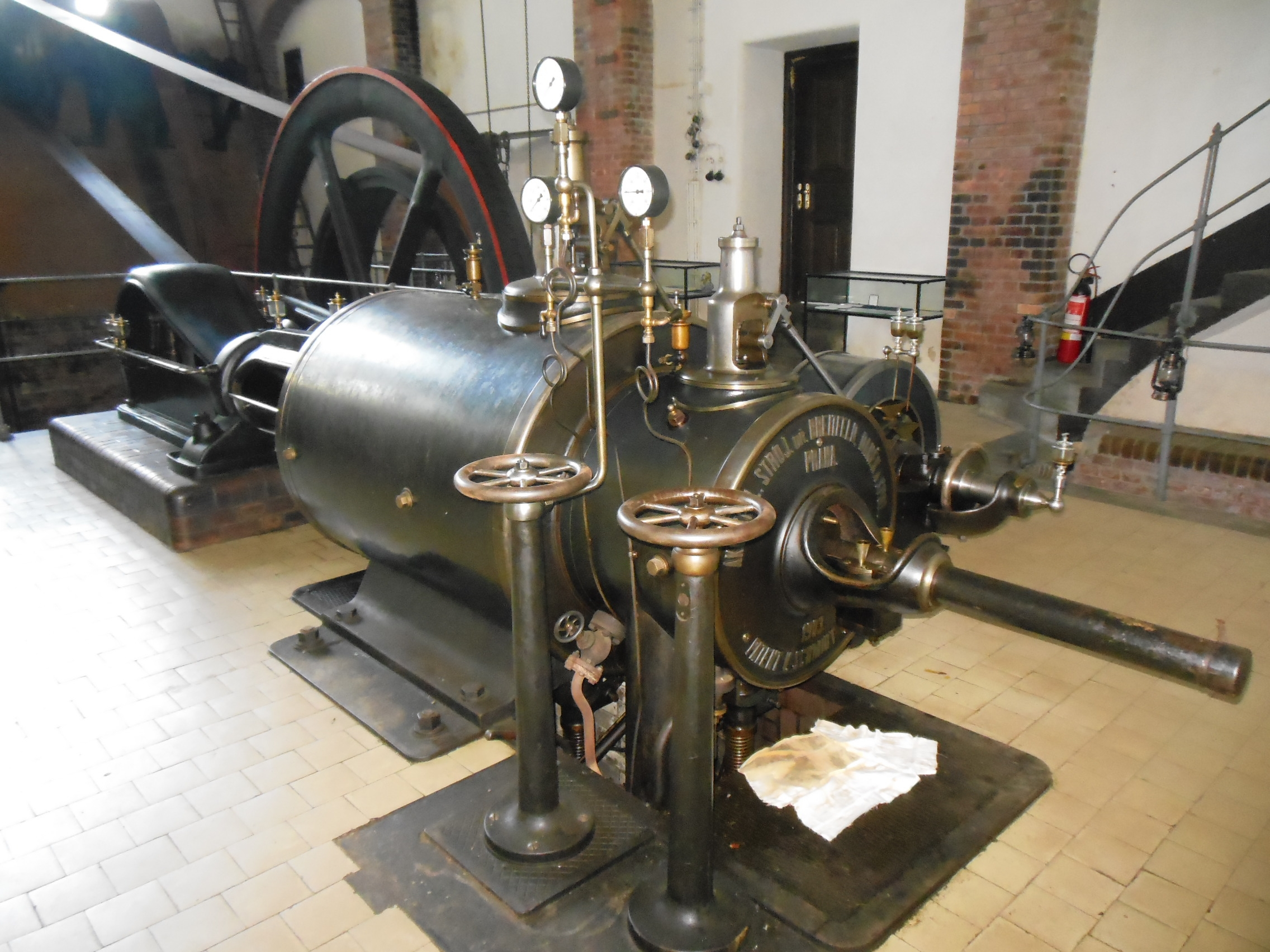 Stará čistírna odpadních vod v ulici Papírenská v Praze-Bubenči. Parní stroj Breitfeld a Daněk.